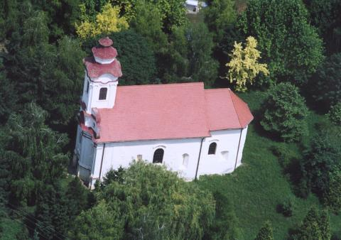 Hetes, Hungary, aerialphotography. Szent György római katolikus templom